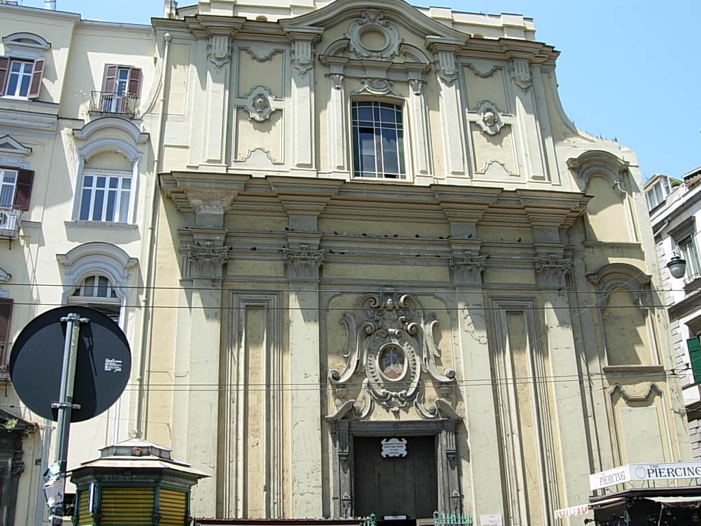 Chiesa di Santa Maria di Caravaggio in Napoli Foto personale concessa in PD